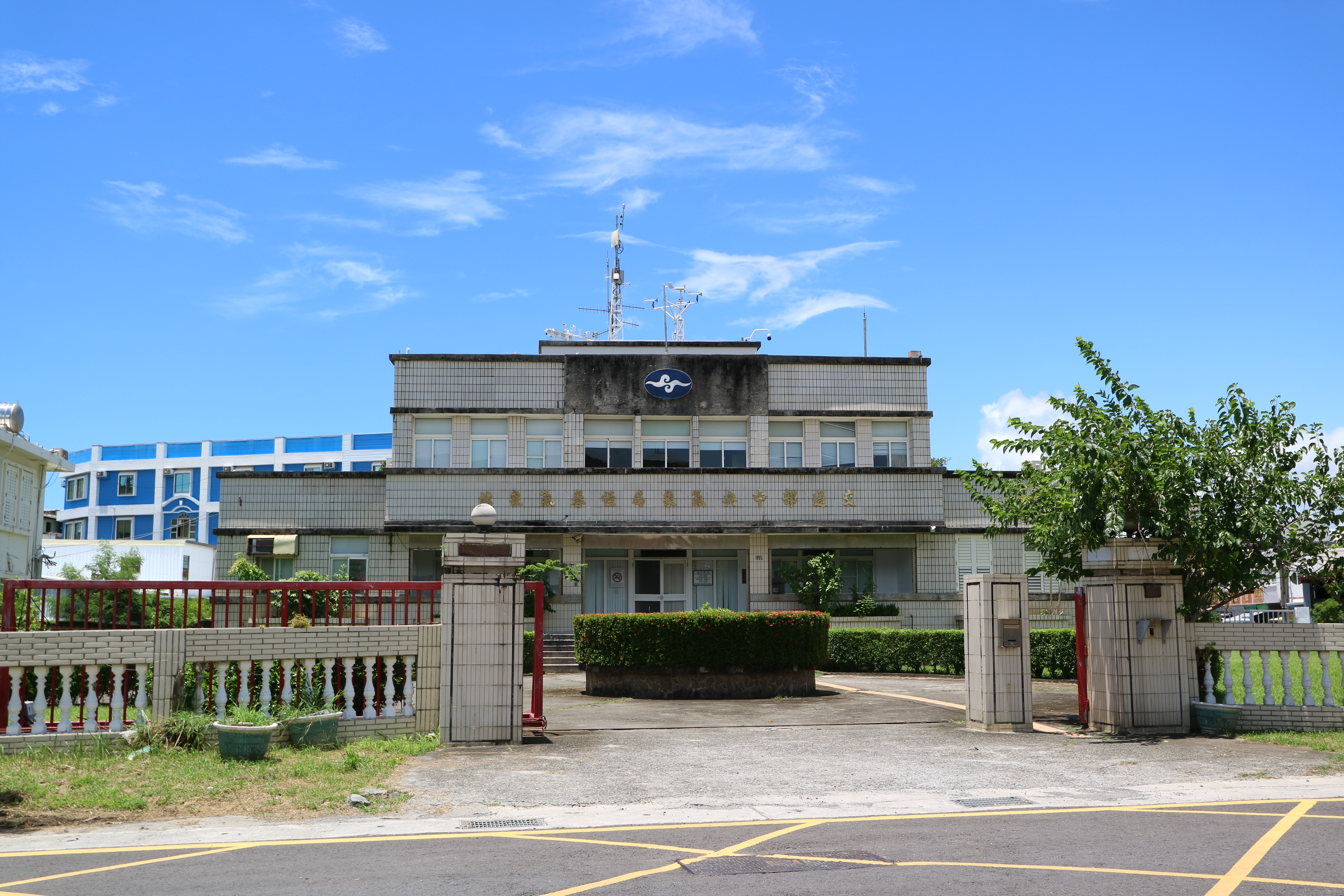 中文（台灣）: 交通部中央氣象局恆春氣象站大門及新辦公廳